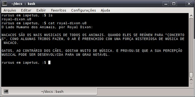 Exemplo de um documento em texto puro